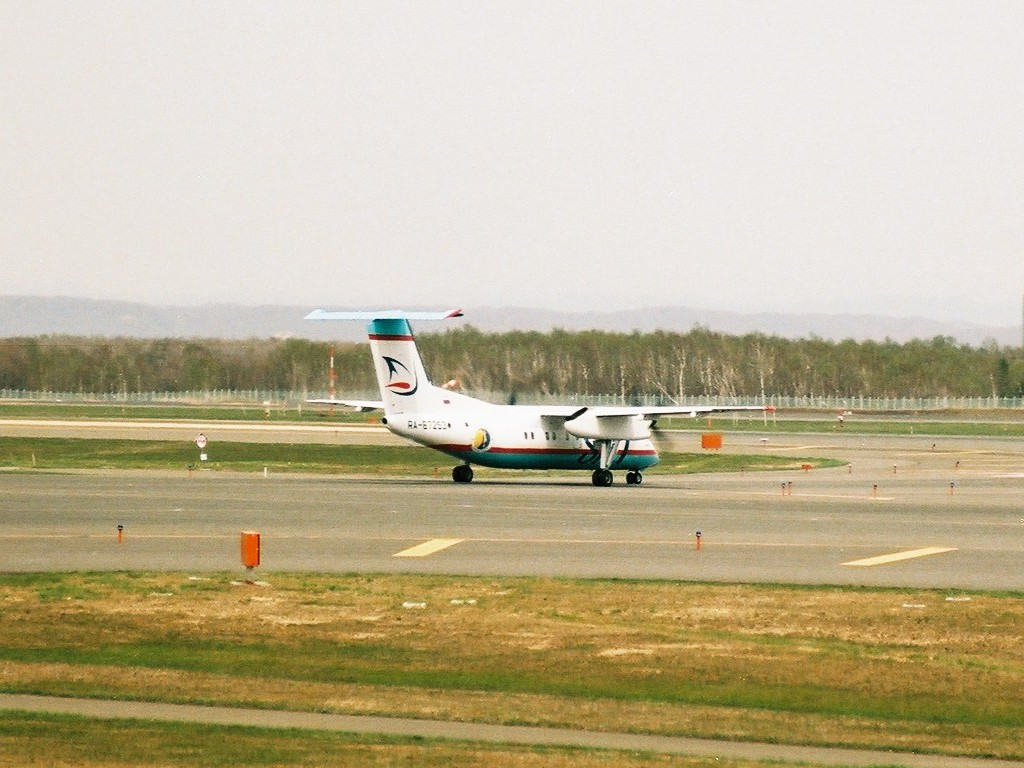 SAT Airlines (HZ/SHU) DHC-8-102 (RA-67253) / サハリン航空（HZ/SHU）の DHC-8-102 （RA-67253）。 新千歳⇔ユジノサハリンスクは国際線なのにプロペラ機という珍しい路線。 ((2006/05/13 New Chitose Airport, Hokkaido, JAPAN)